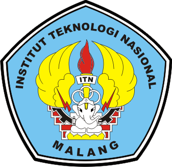 Logo Institut Teknologi Nasional Malang